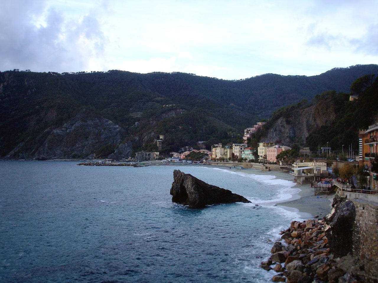 Panorama di Monterosso al Mare, Liguria, ItaliaMonterosso al Mare